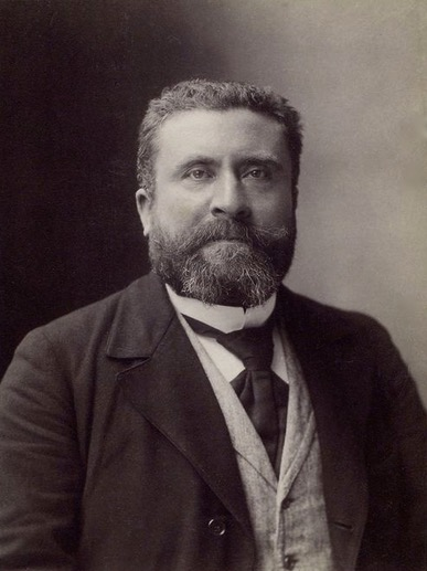 Portrait de Jean Jaurès, par Nadar, 1898.